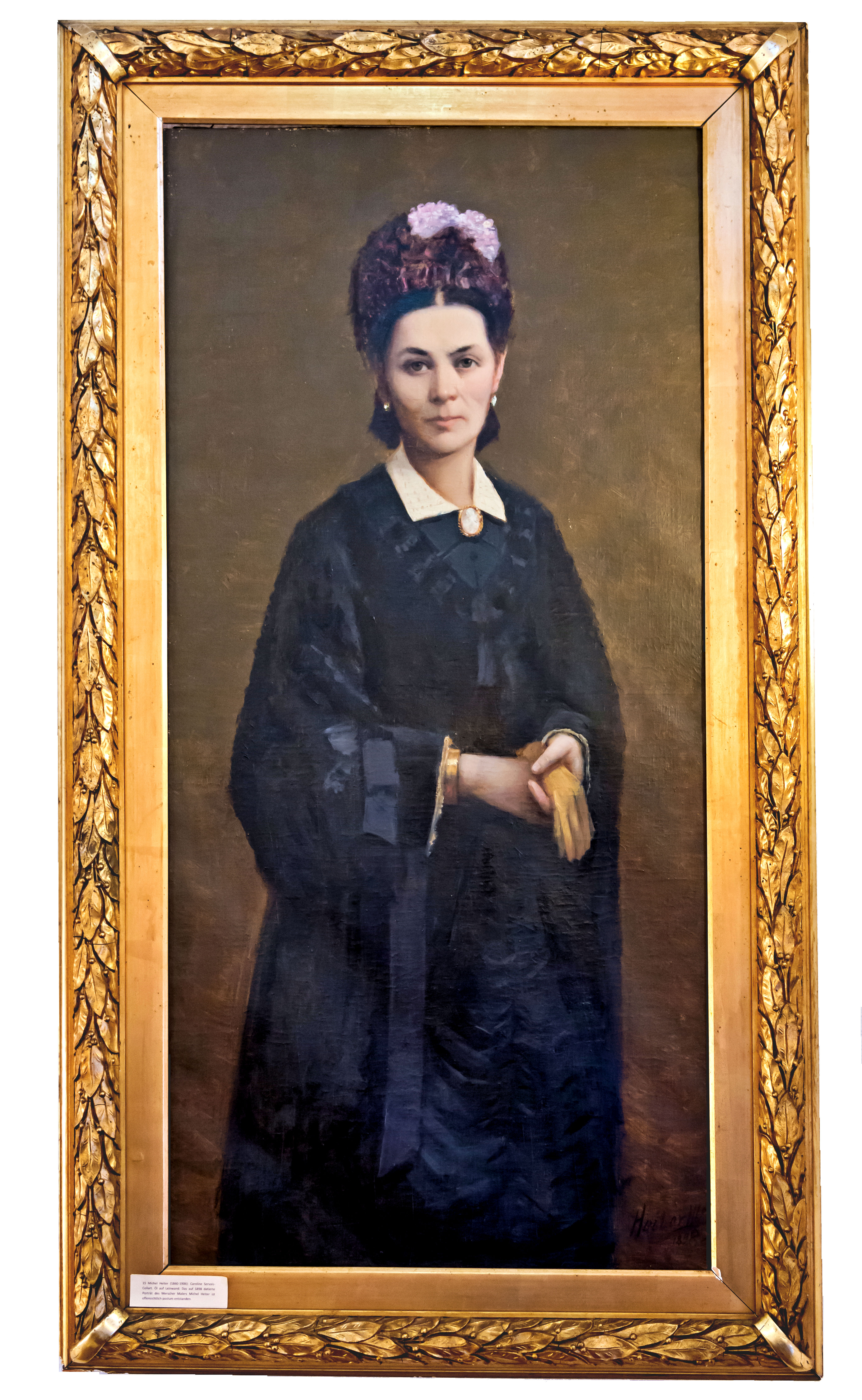 De Portrait Caroline Servais-Collart vum Kënschtler Michel Heiter hänkt am Servais-Haus zu Miersch. D'Wierk ass datéiert op 1898, gouf deemno posthum vun him gemoolt.